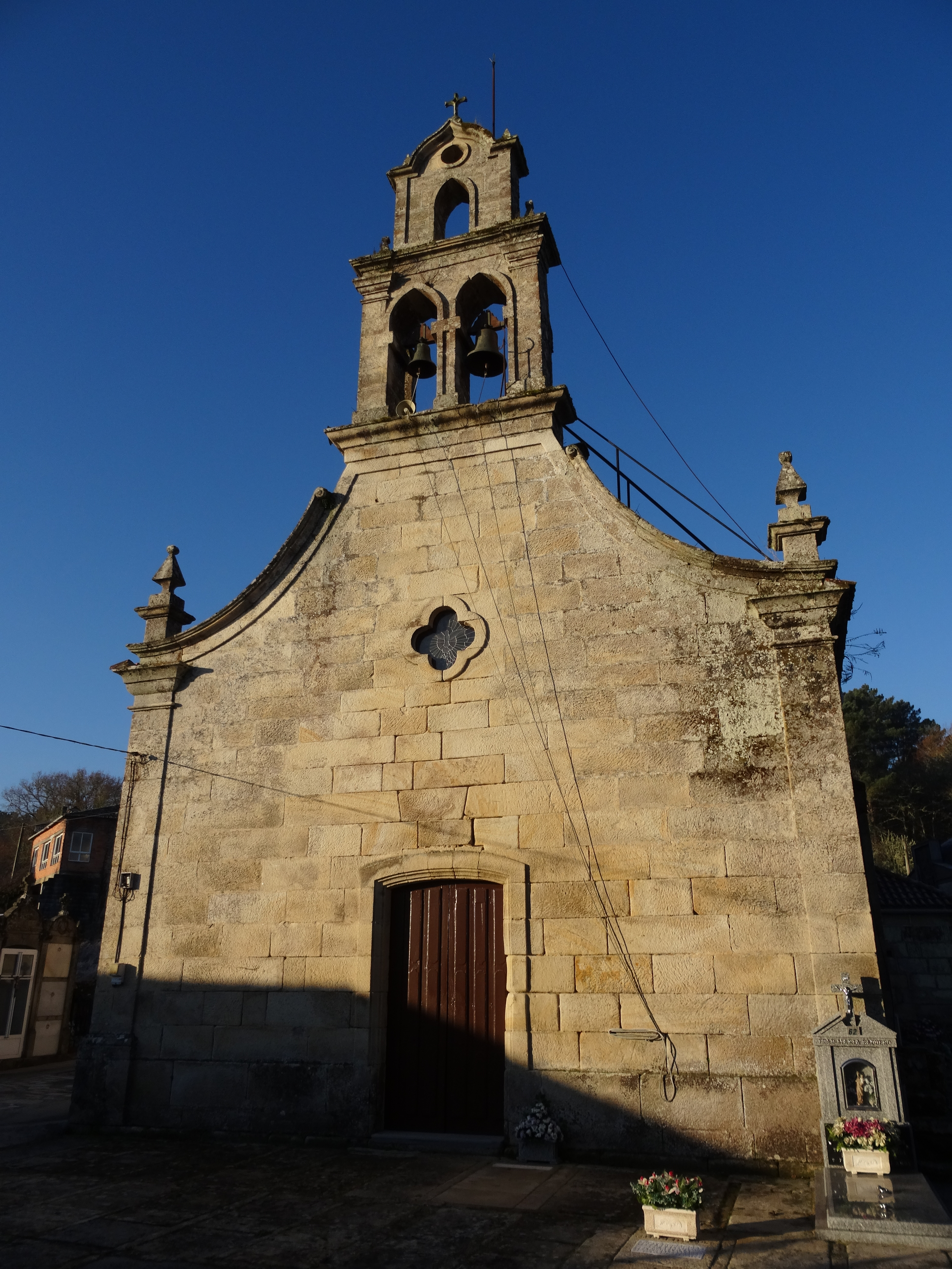 Ver título.